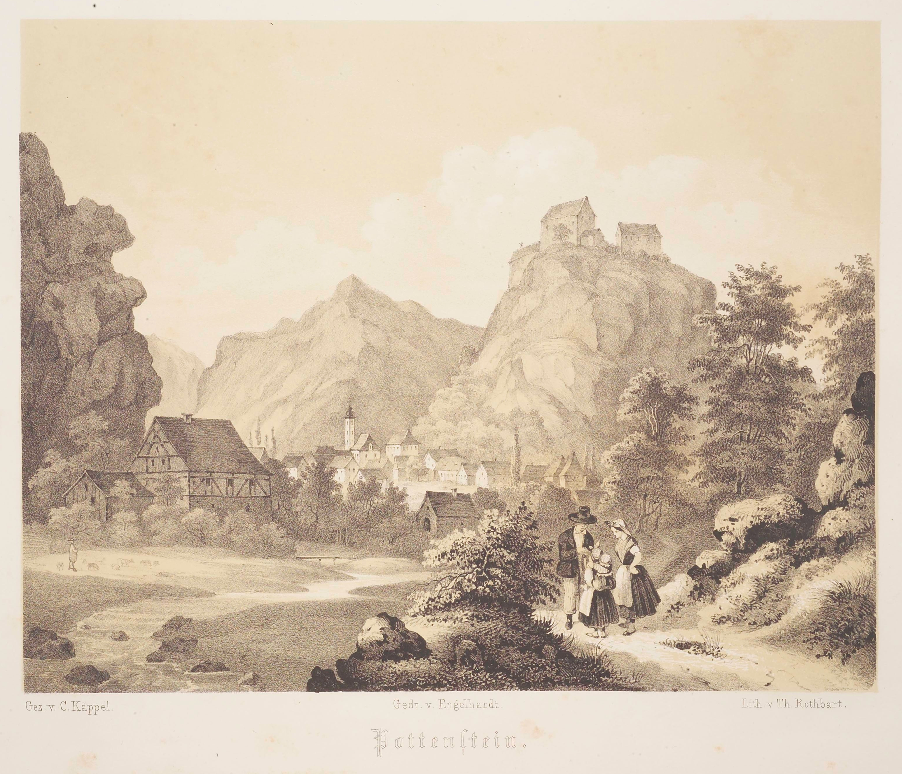 Pottenstein in Fränkische Schweiz. Cyclus der der interessantesten Punkte aus der Umgegend von Muggendorf und Streitberg. Sechzehn in Ton gedruckte Lithographien. Nach Originalzeichnungen von C. Kaeppel lithographirt von Th. Rothbarth.